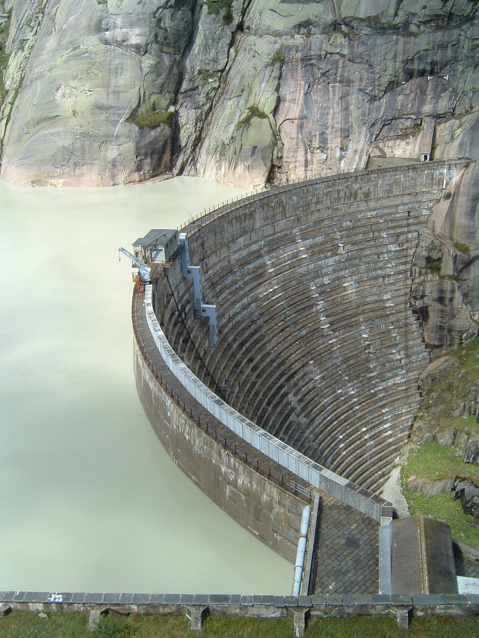 Die Spitallamtalsperre am Grimselpass